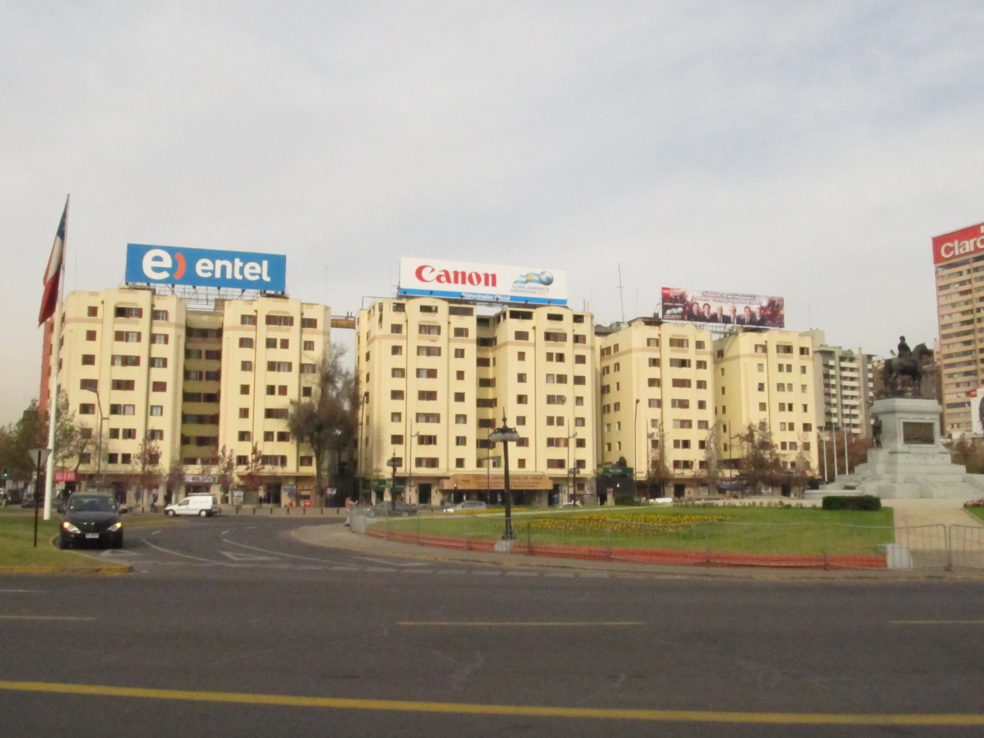 Edificios Turri, Santiago de Chile.